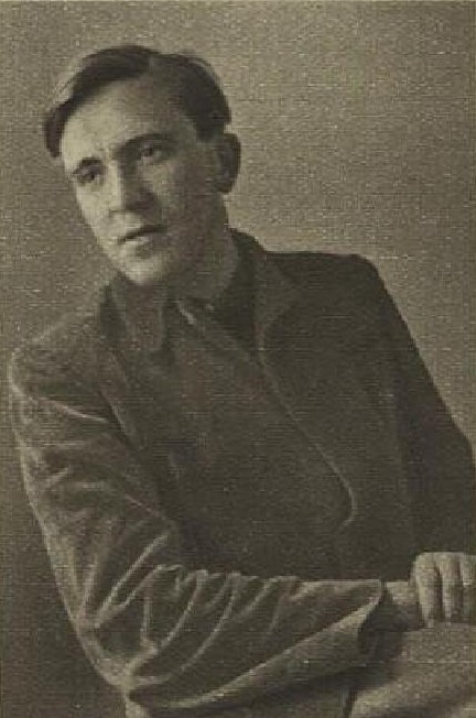 Karel Palouš (1913-1999), český herec, režisér, divadelní ředitel a pedagog.